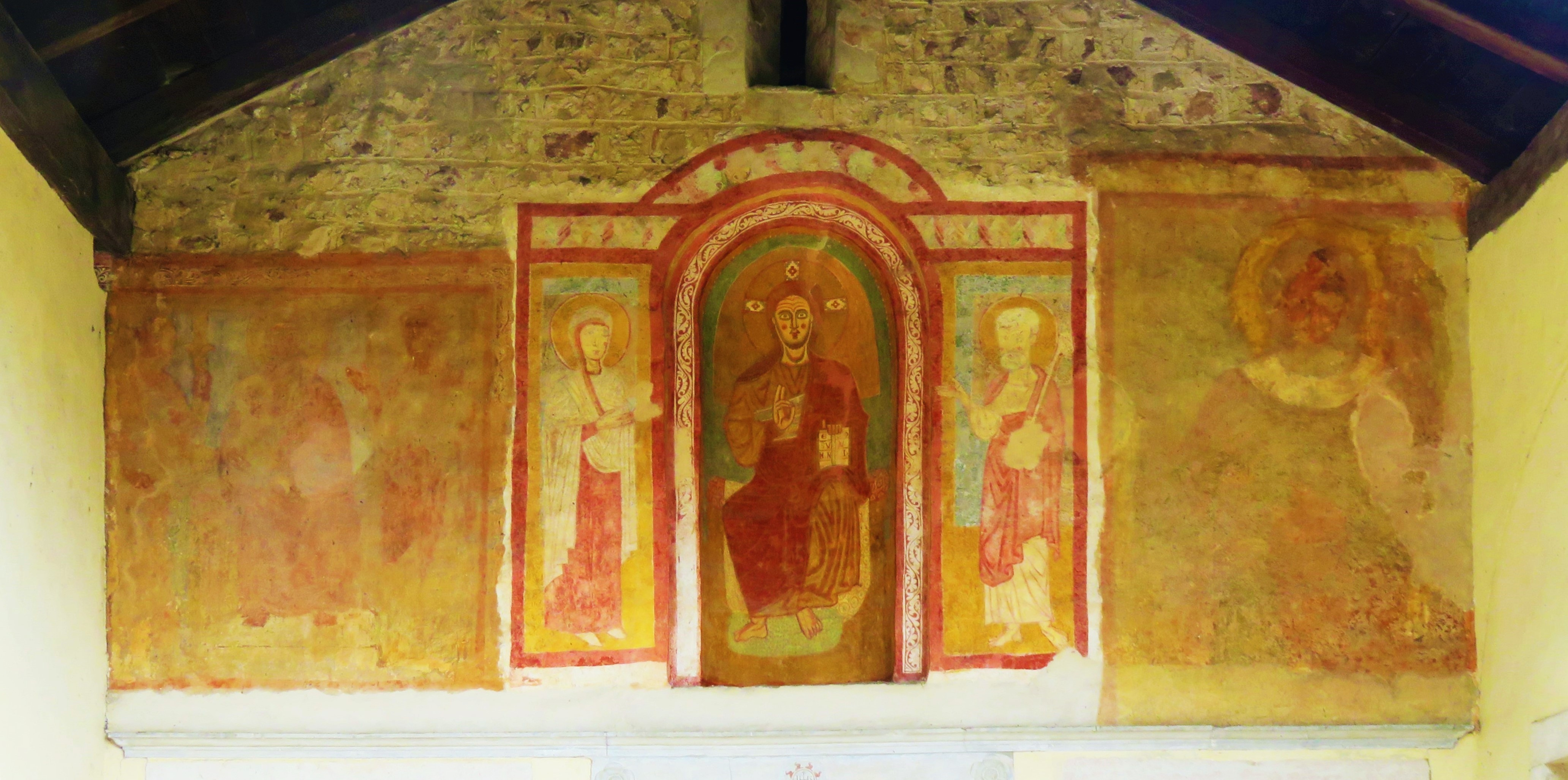 Atrio coperto con tetto ligneo a capanna. Affreschi.